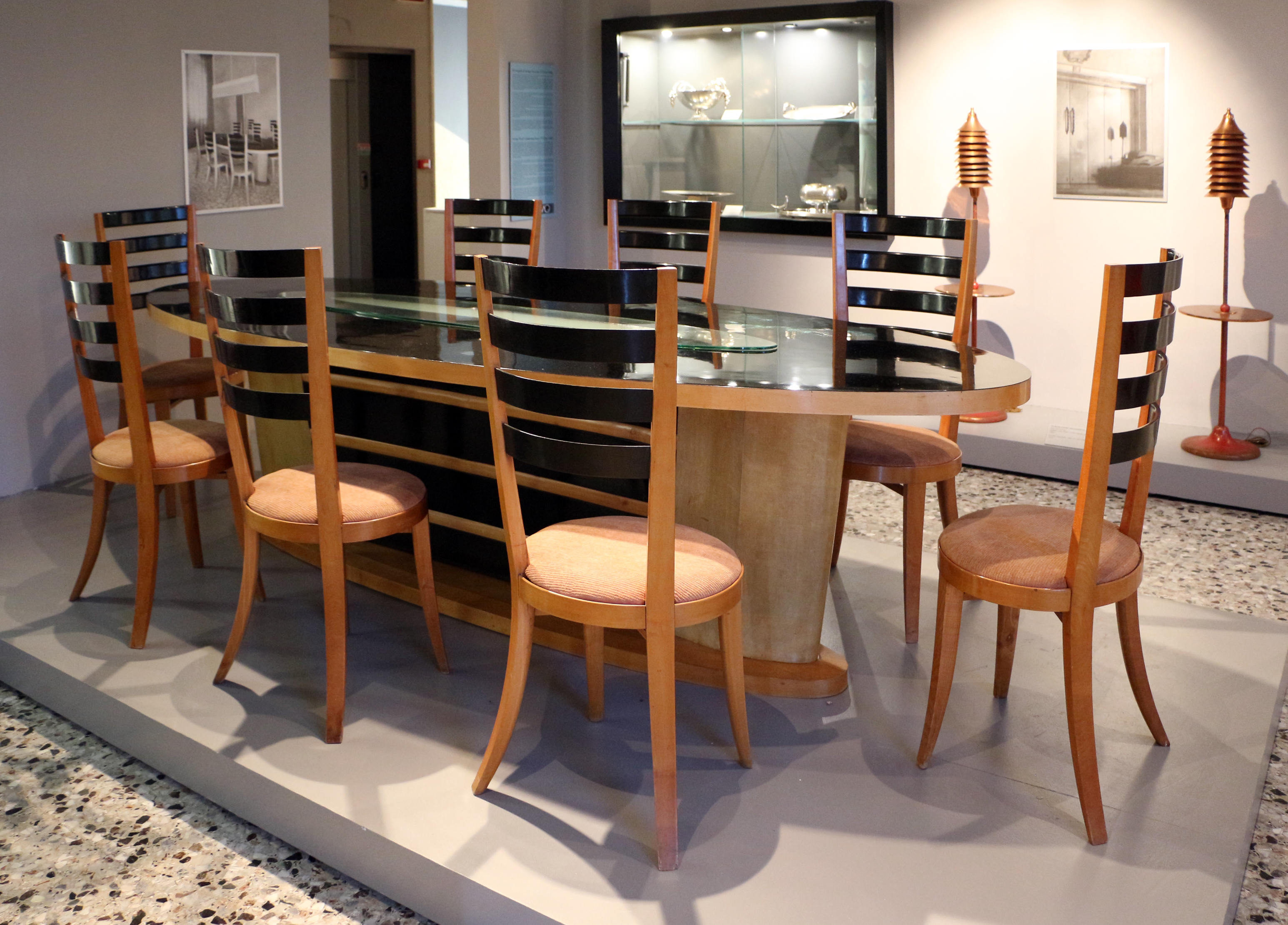 Il parco e i musei di Nervi This is a photo of a monument which is part of cultural heritage of Italy.